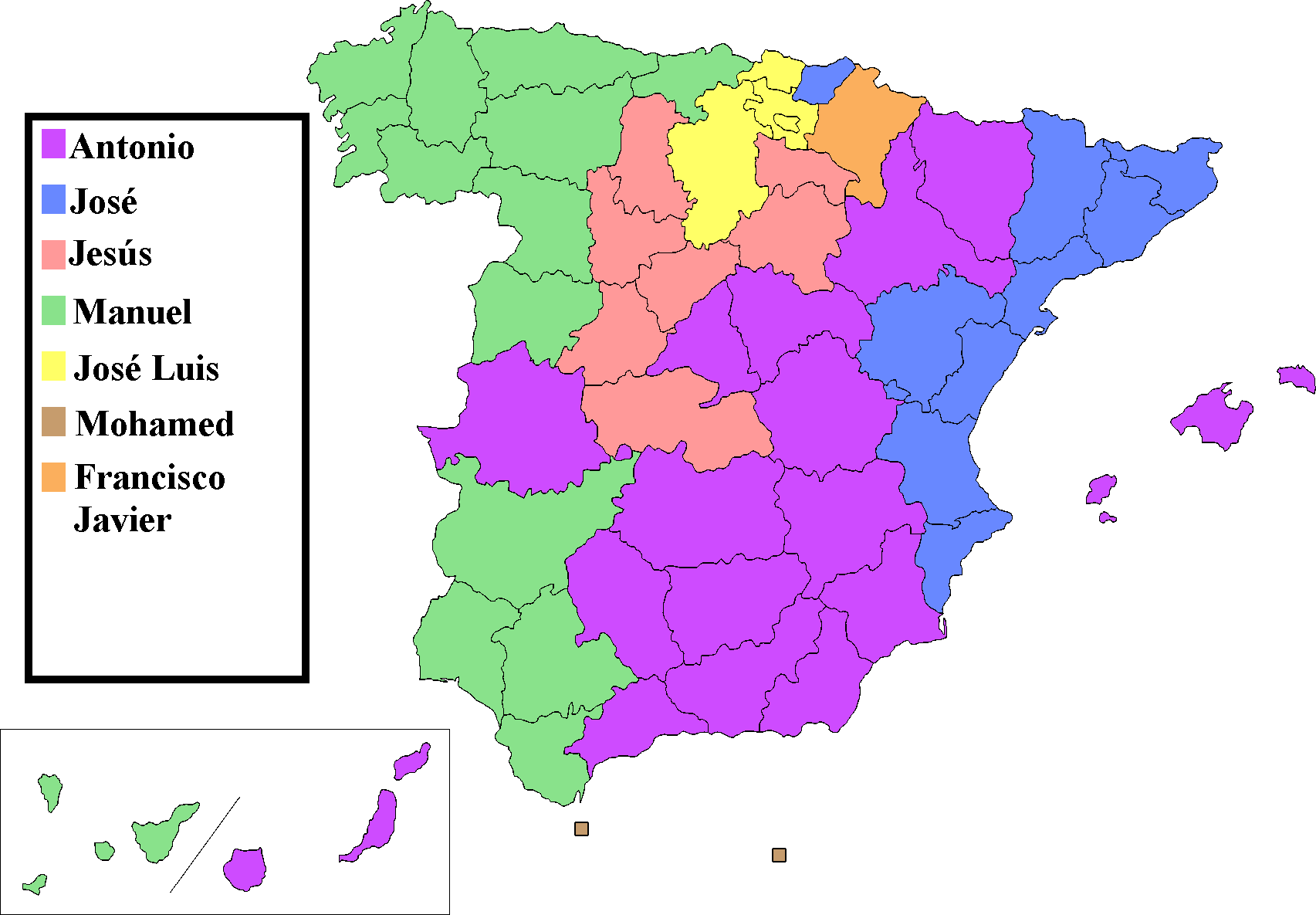 Nombres más comunes en España por provincia de residencia